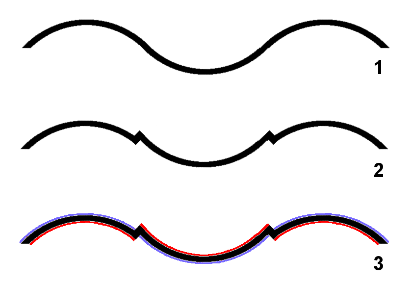 Ukázka konvexní, konkávní a konvexně-konkávní křivky v architektuře